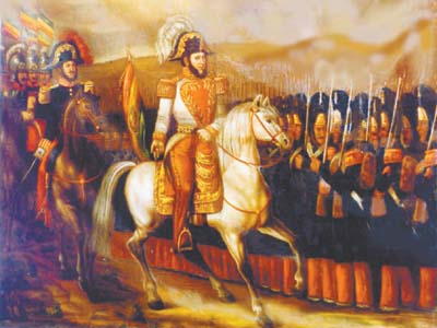 José Ballivián passant en revue ses troupes, bataille d'Ingavi. 1841